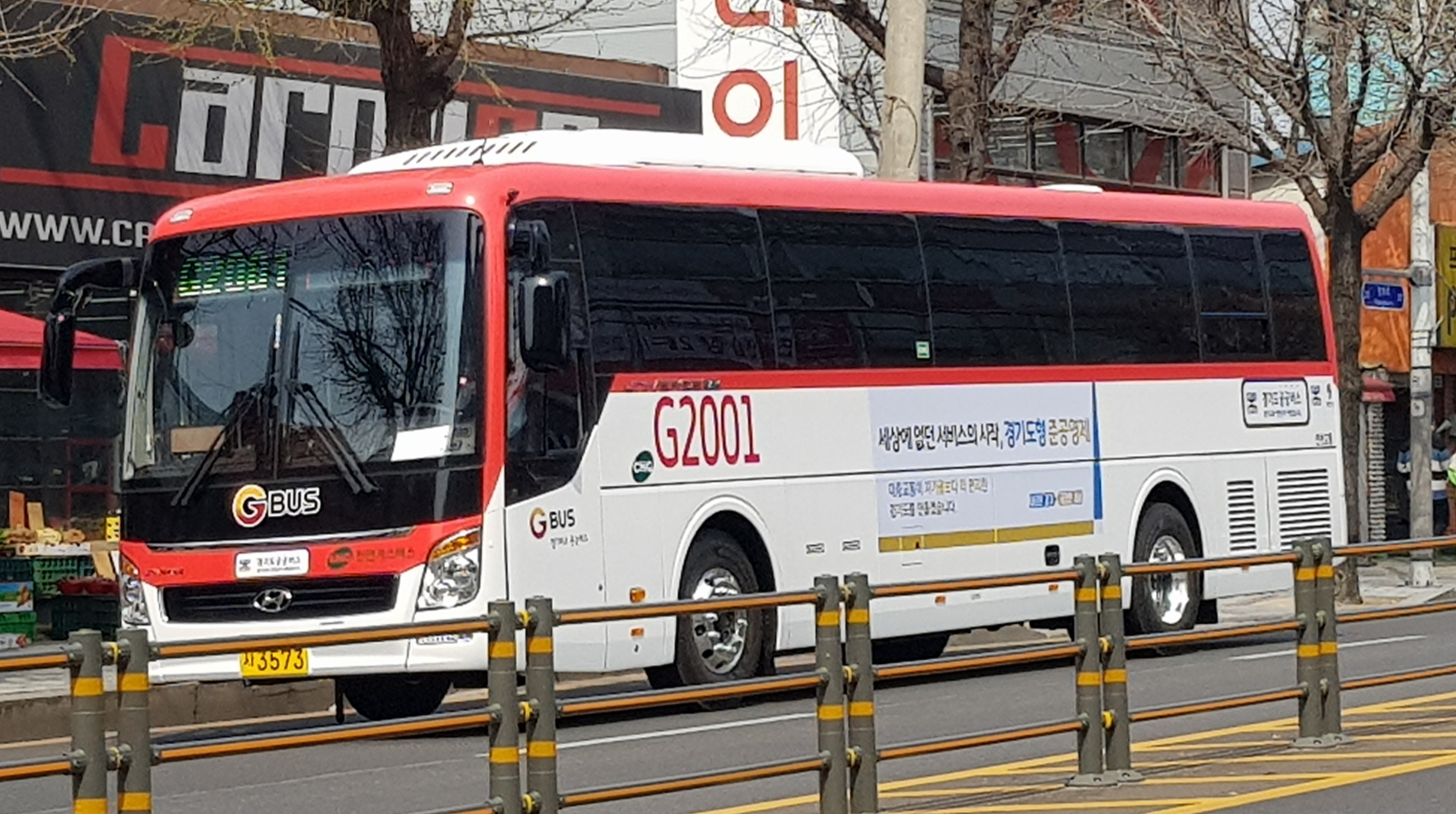 연천교통에서 운행하는 연천군 직행좌석버스 G2001번